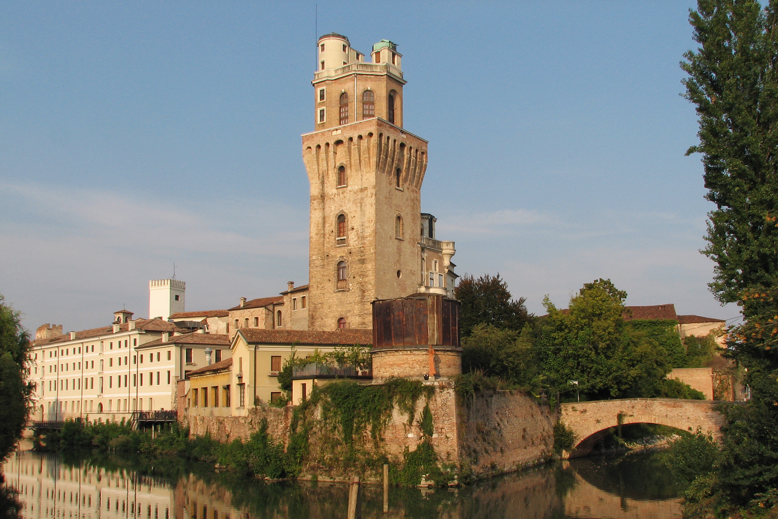 La Specola di Padova. In questo punto il Naviglio Interno si dirama sulla destra dal Tronco Maestro che continua verso sinistra.